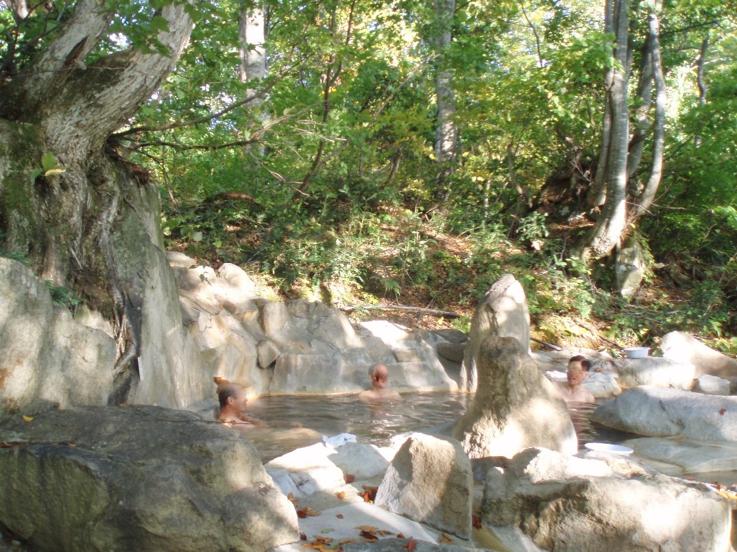 長野県小谷村小谷温泉、寸志で入浴できる露天風呂。